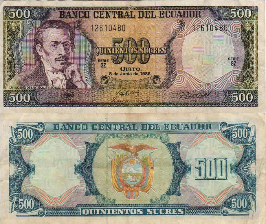 Ecuadorian 500 Sucres bill